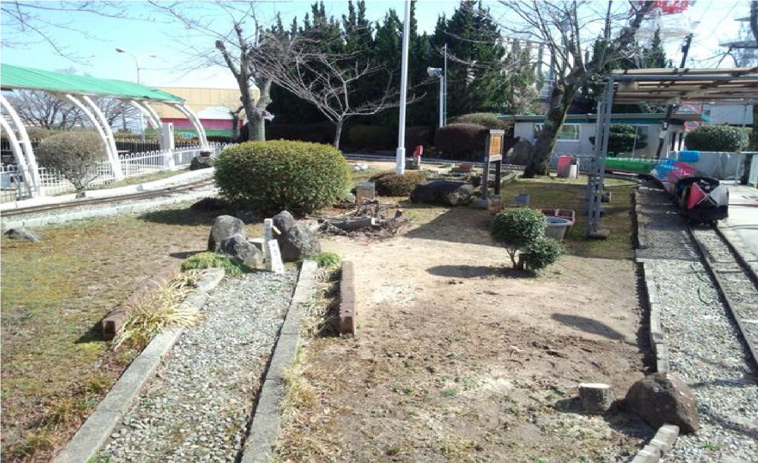 スカイランド生駒のアトラクションの一つ。